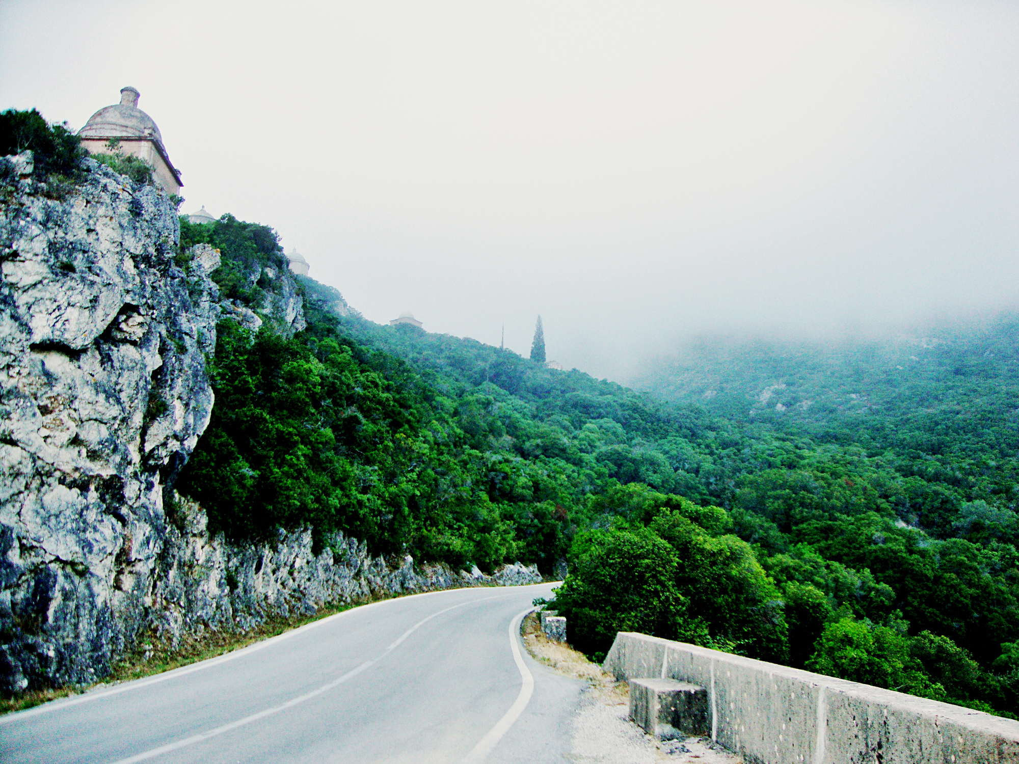 Explorando o topo da serra.Setúbal This is a photography of a Site of Community Importance in Portugal with the ID: PTCON0010. Natura2000 entry, EEA entry